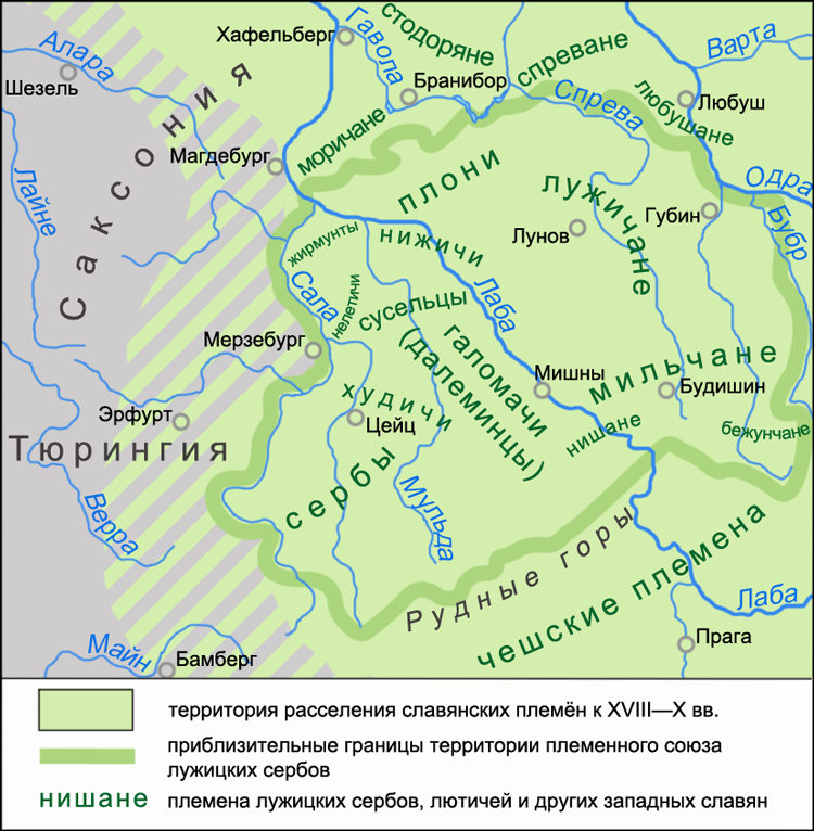 Карта размещения лужицкосербского племенного союза в VIII—X вв.